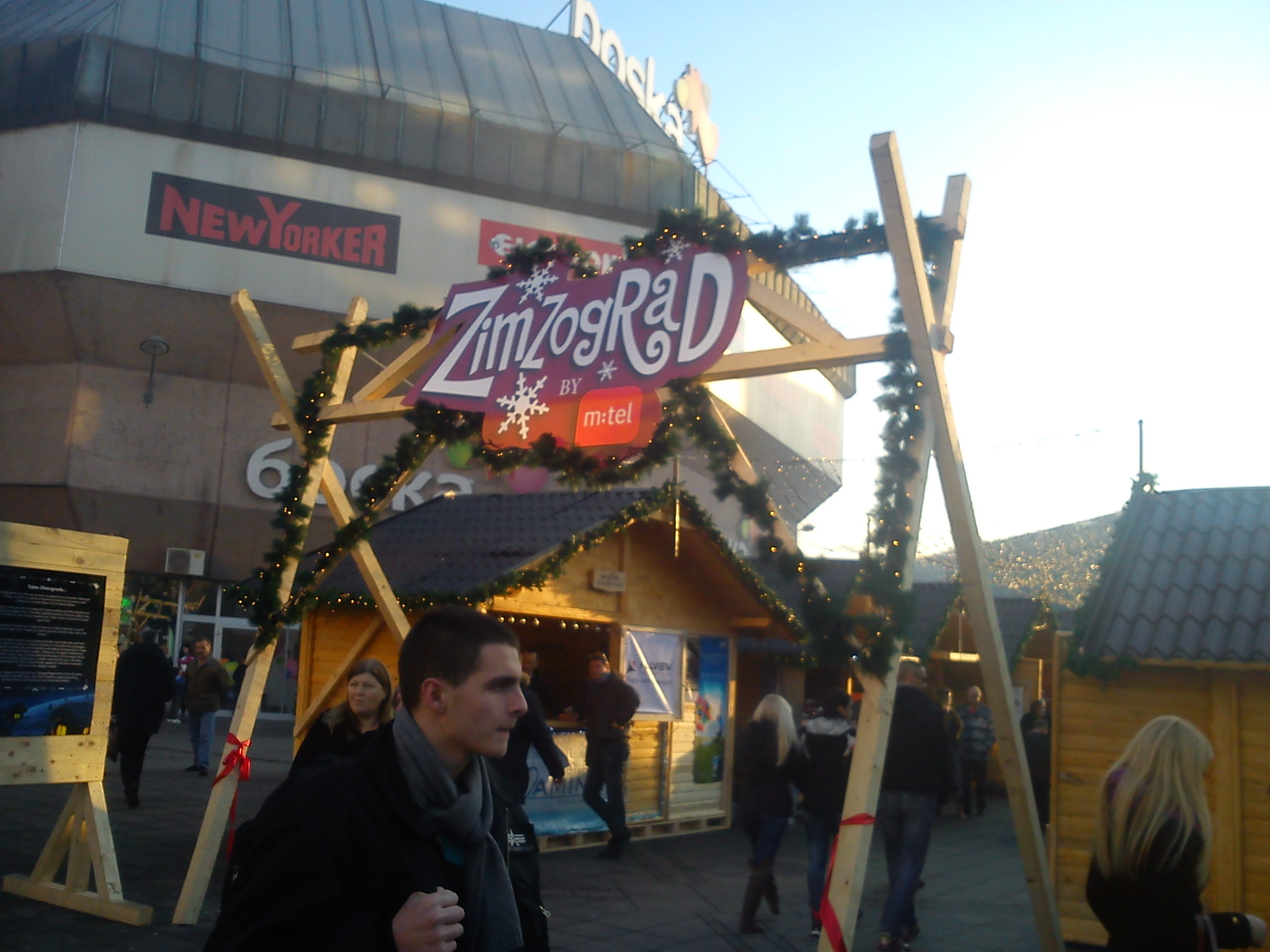 Улаз у Зимзоград, Бања Лука